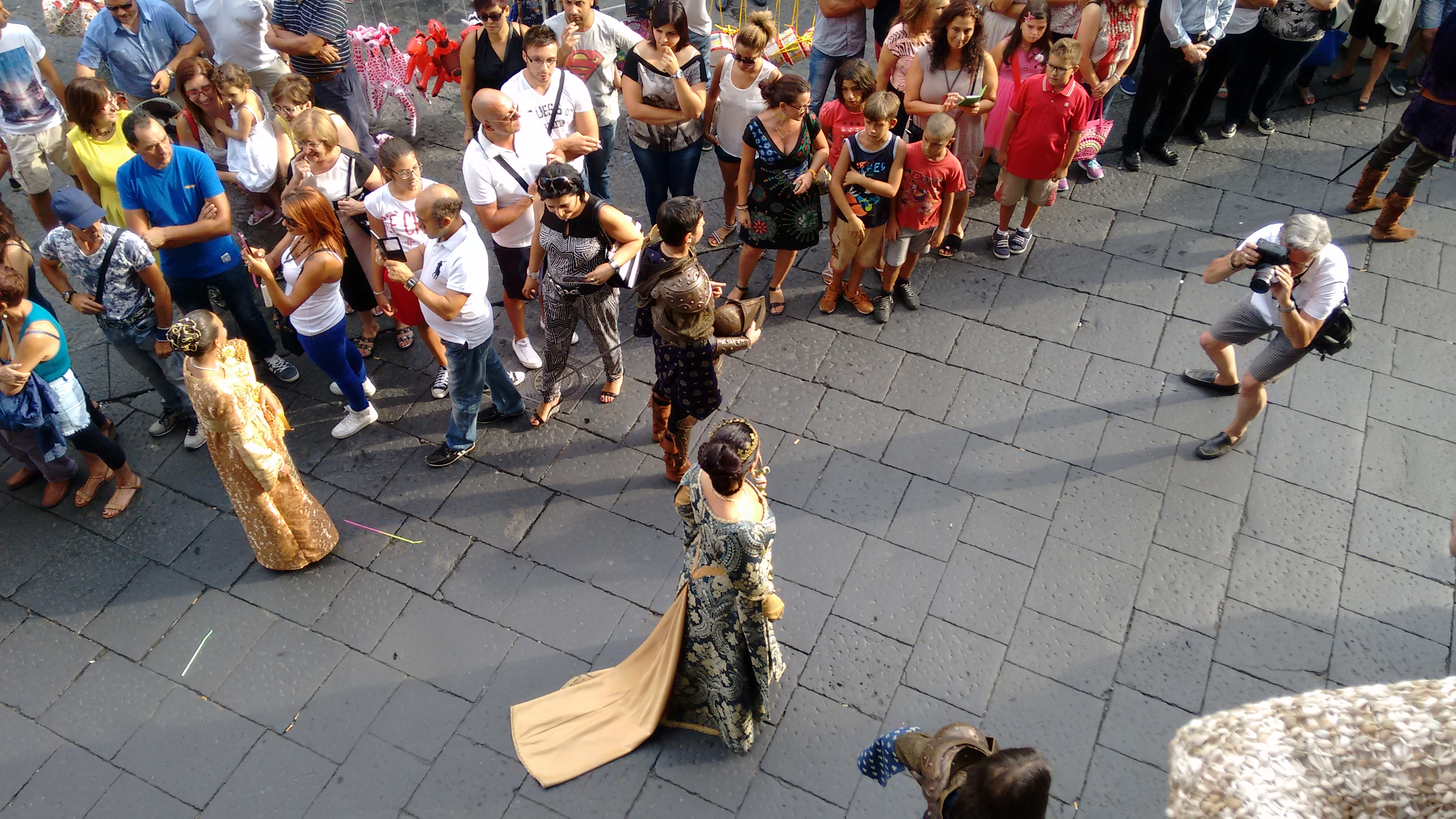 Selciato lavico nelle strade del centro storico This is a photo of a monument which is part of cultural heritage of Italy.